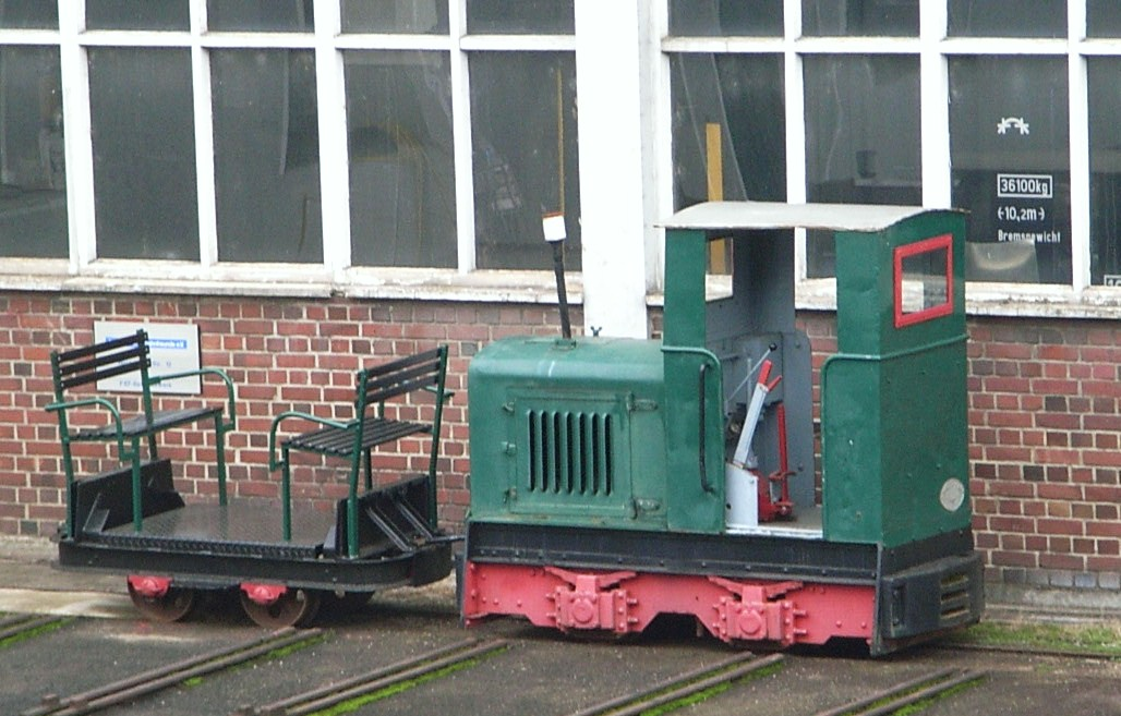 Schmalspurlokomotive Passau